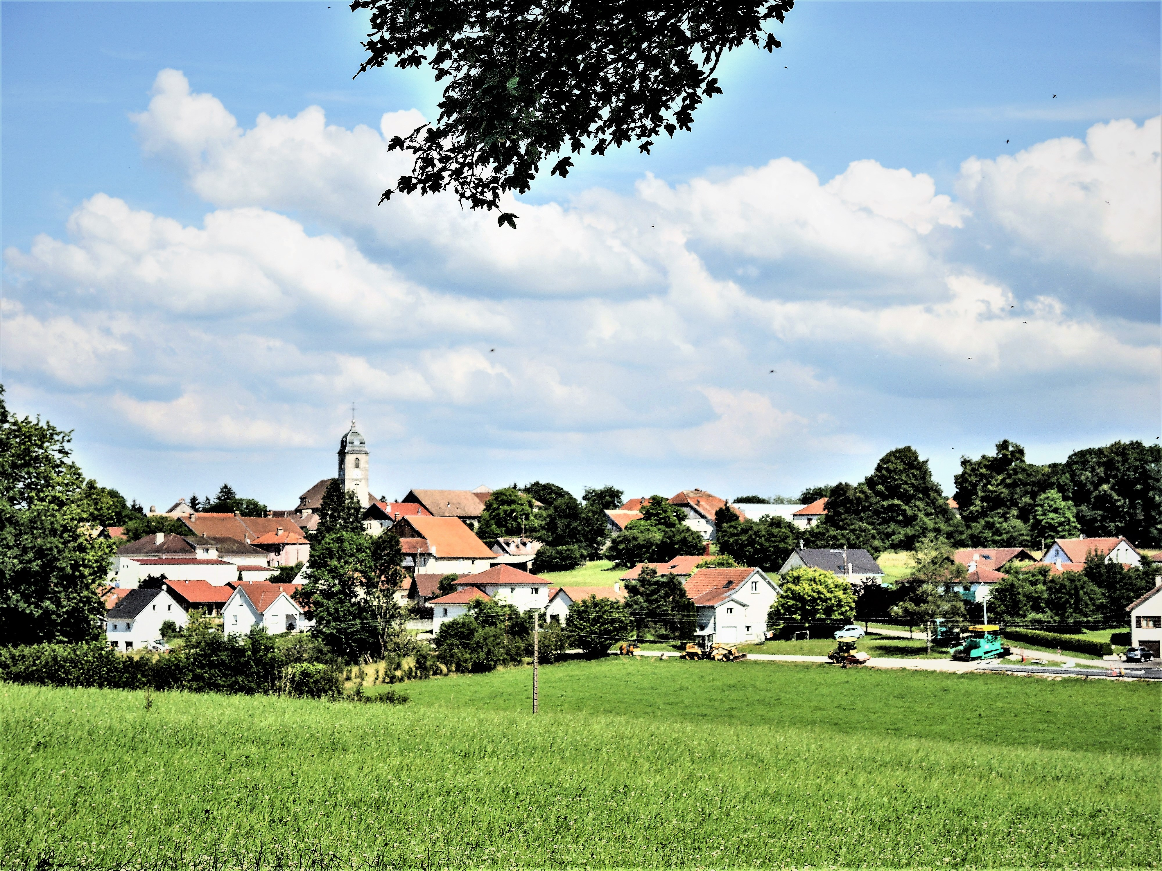 Village de Bouclans, vu des prairies ouest. Doubs